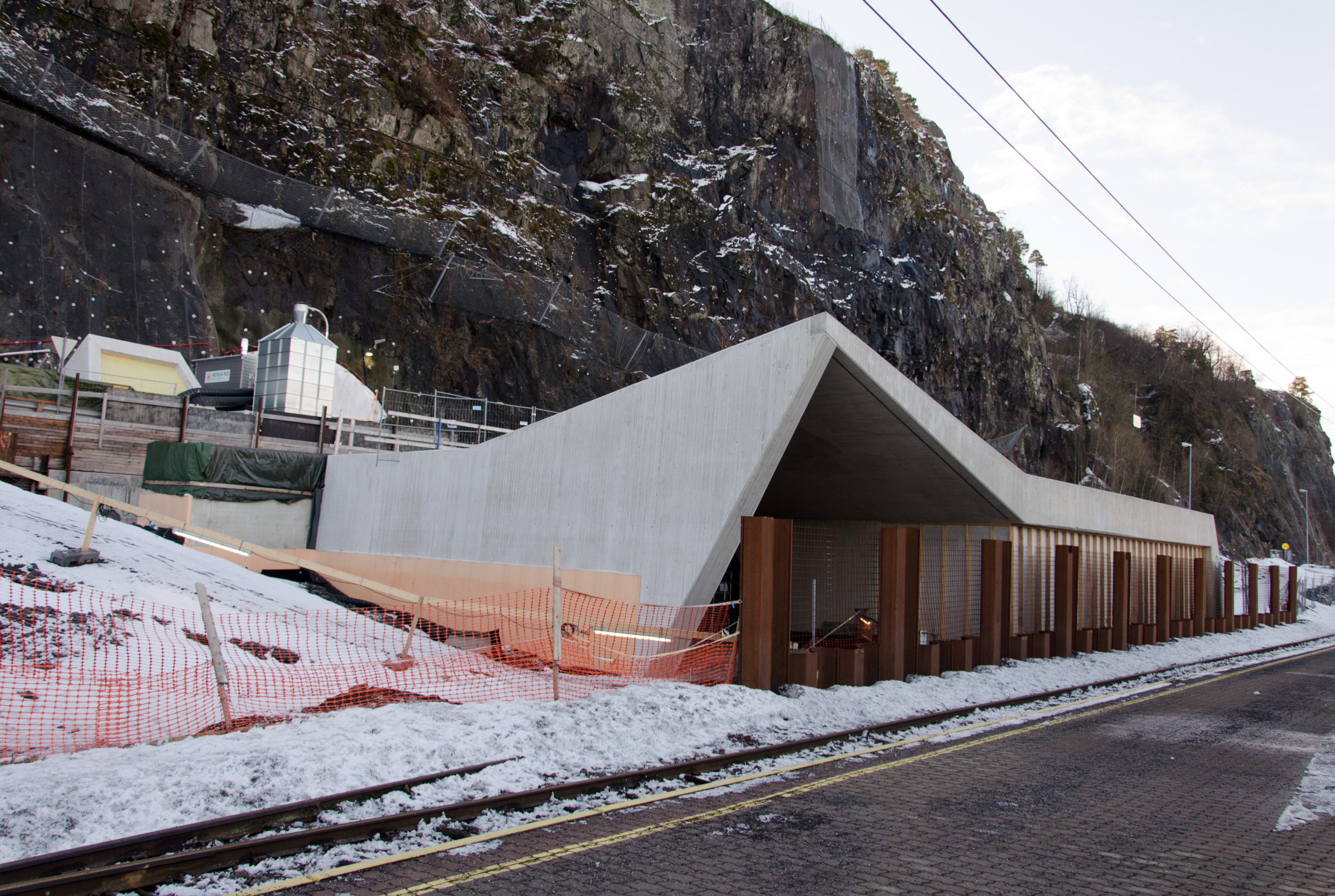 Holmestrand stasjon bygges, februar 2016